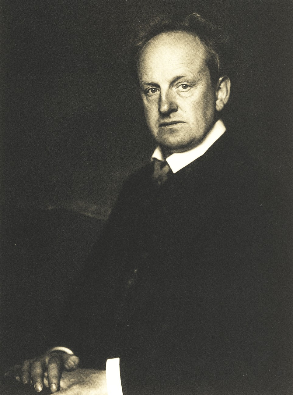 Der Dramatiker Gerhart Hauptmann auf einer Fotografie von Nicola Perscheid.